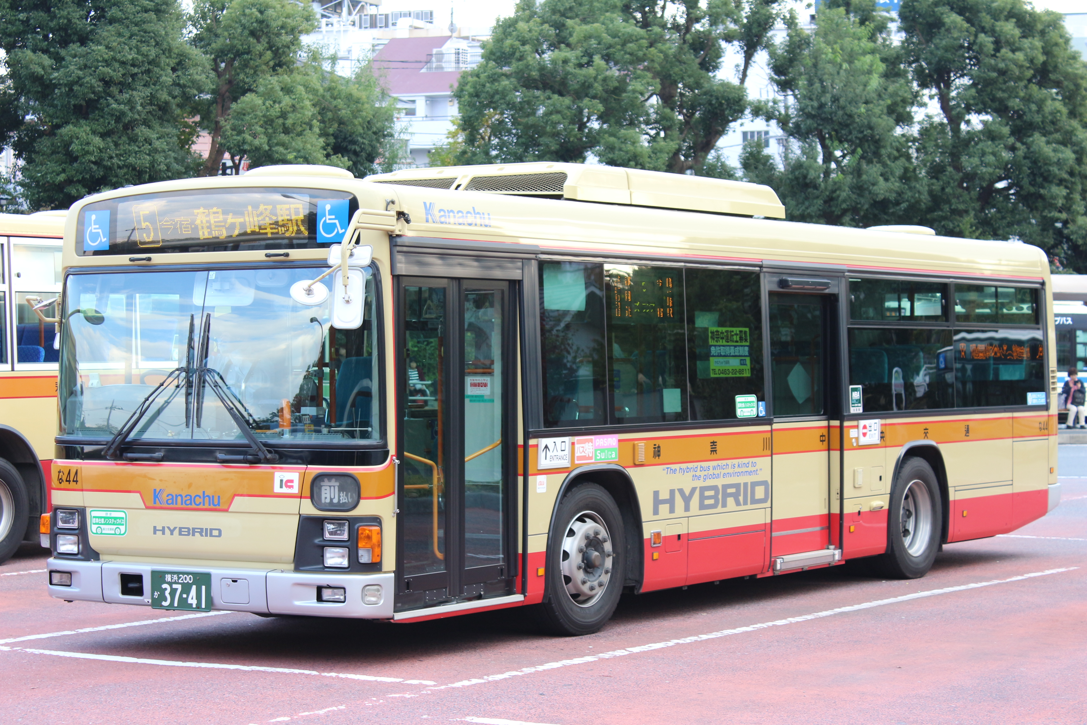 神奈川中央交通、いすゞ「エルガハイブリッド」QQG-LV234L3、中山営業所「な44」号車。 前面と左側面。